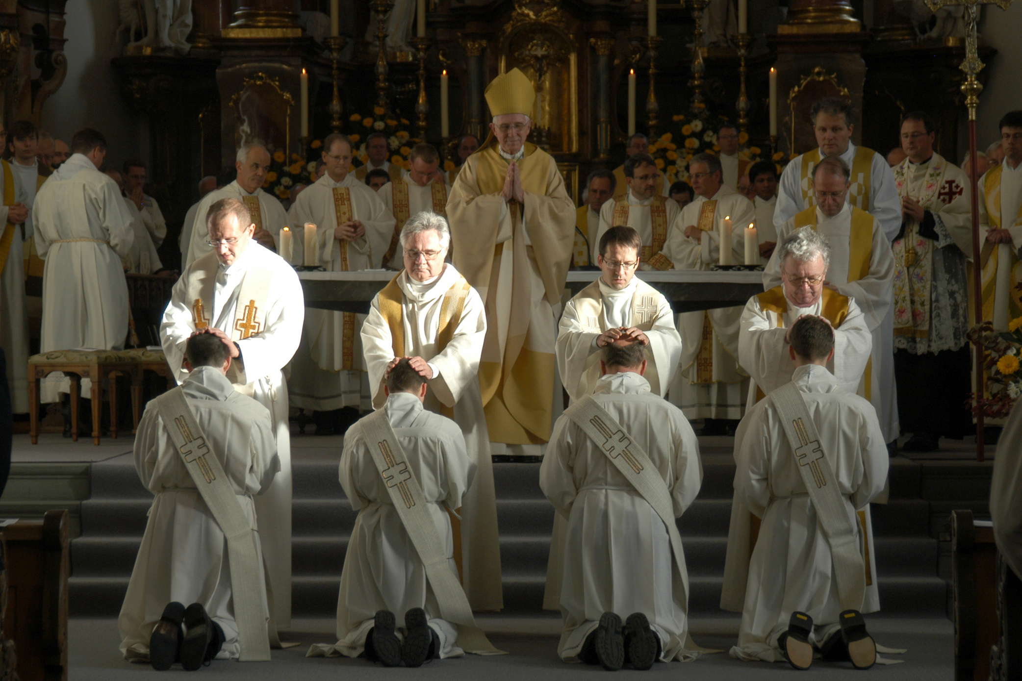 Priesterweihe in Schwyz